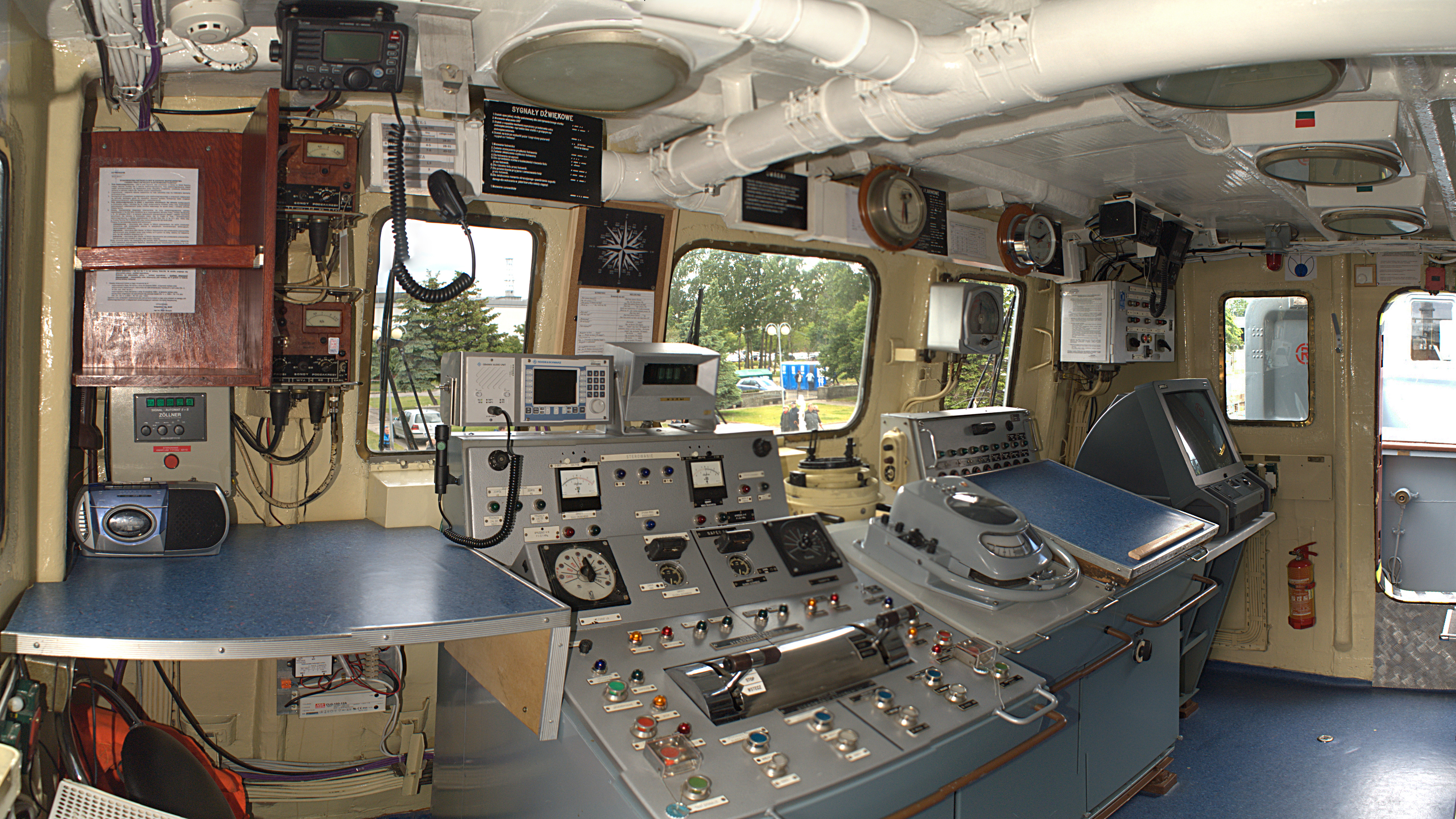 Trałowiec w basenie Prezydenta w Gdyni. Manewry Baltops 2012.